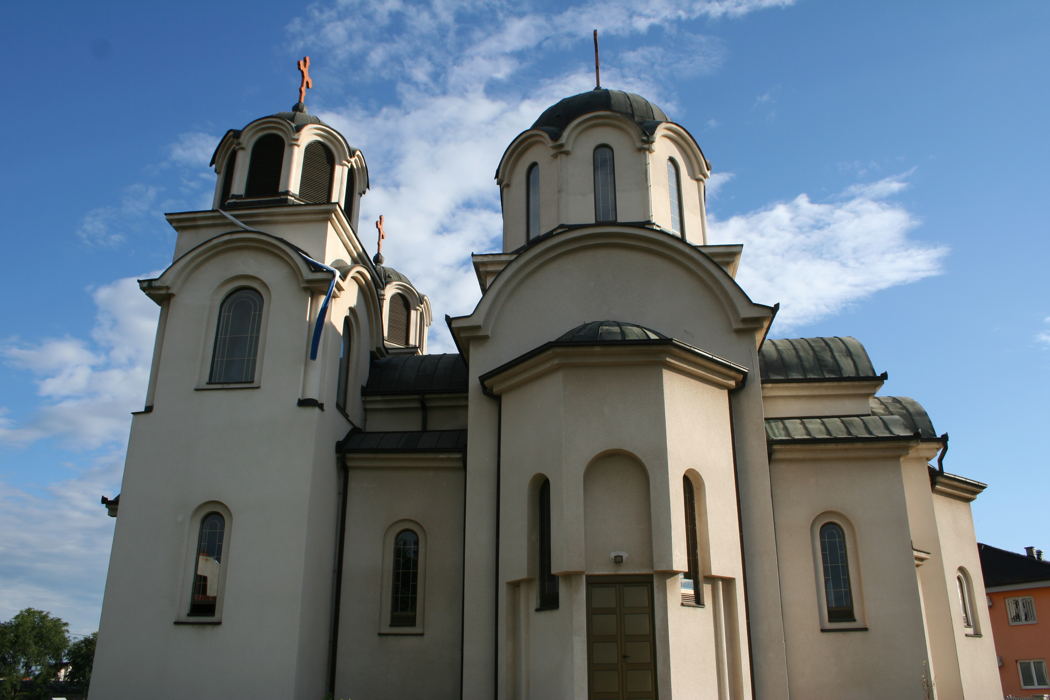 Crkva Svetog Vasilija Ostroškog u Kasarskim livadama